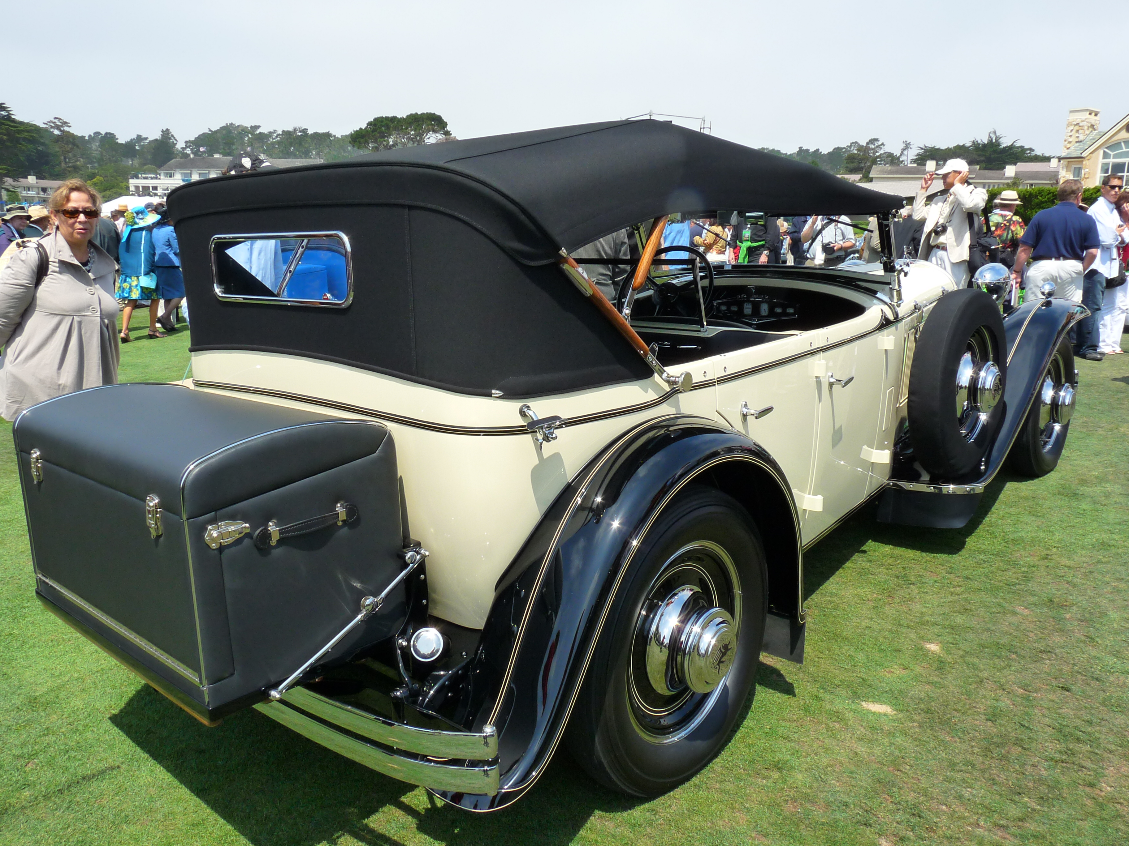 1930 Ruxton Model C Rauch & Lang Phaeton